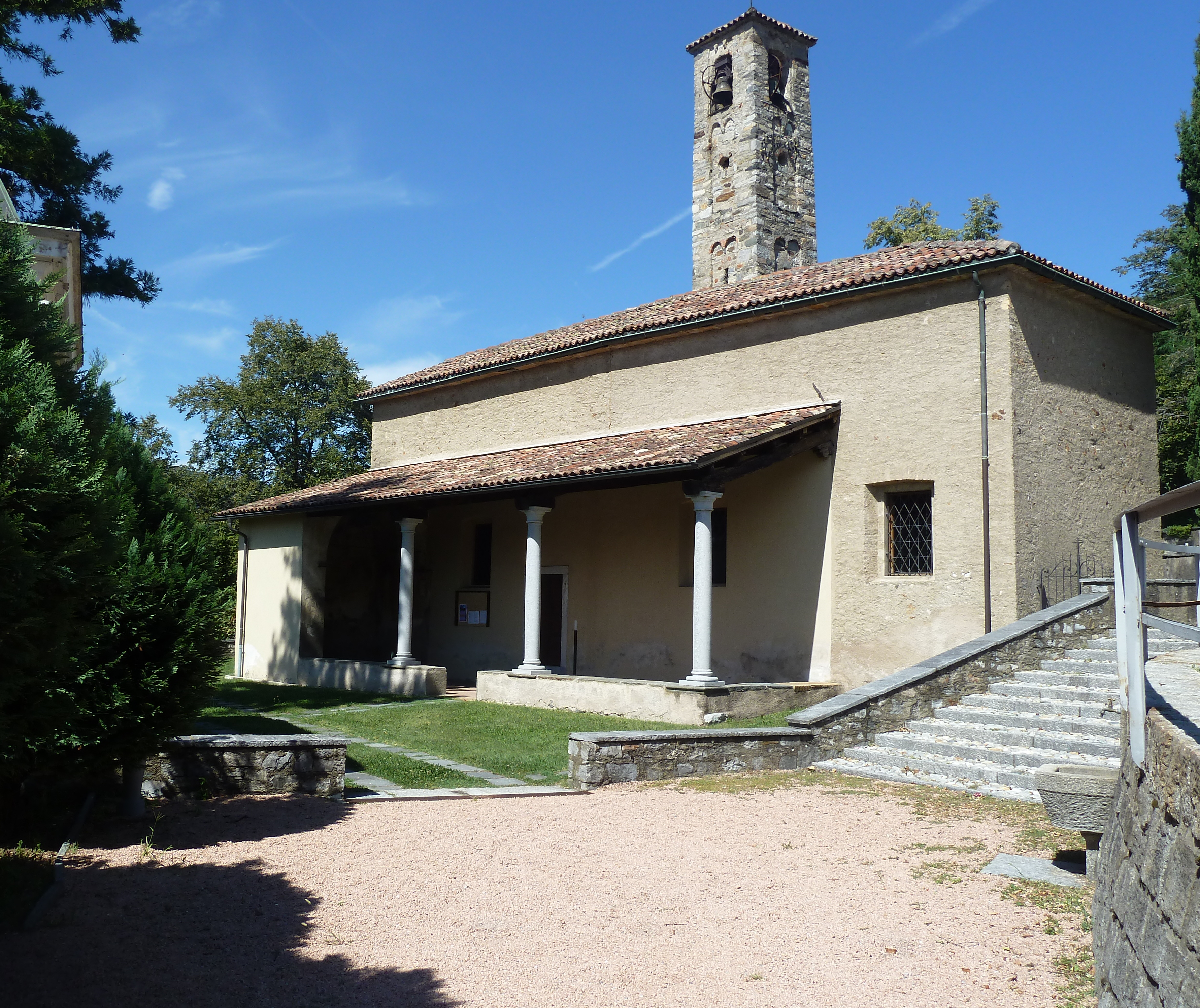 Chiesa di San Nazario a Dino